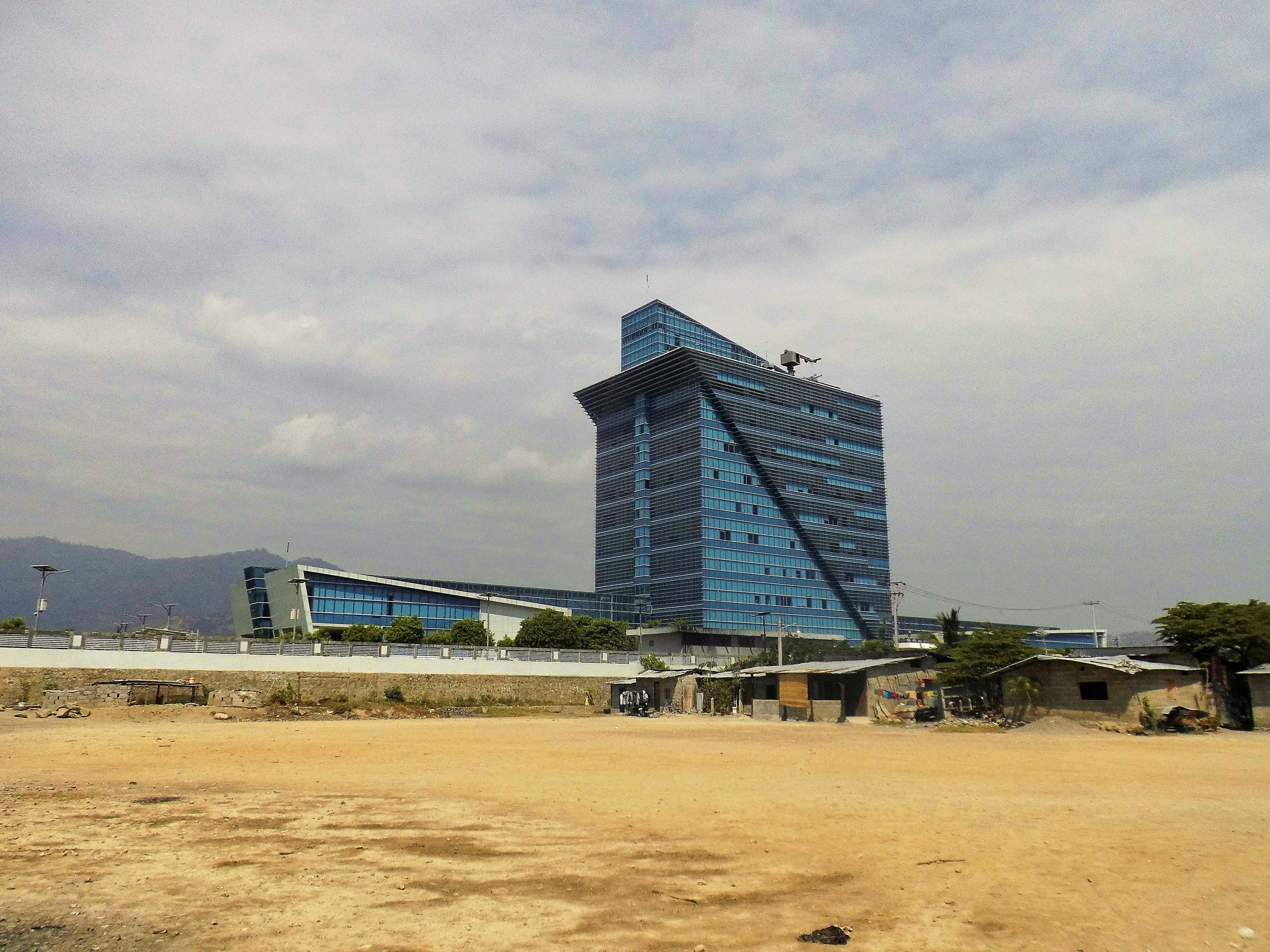 Finanzministerium, Dili, Osttimor